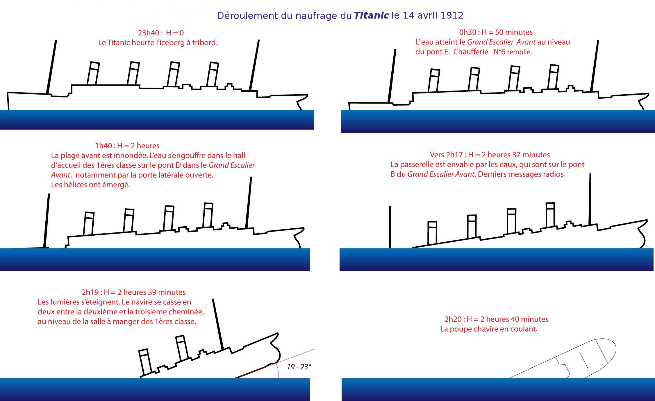 Révision